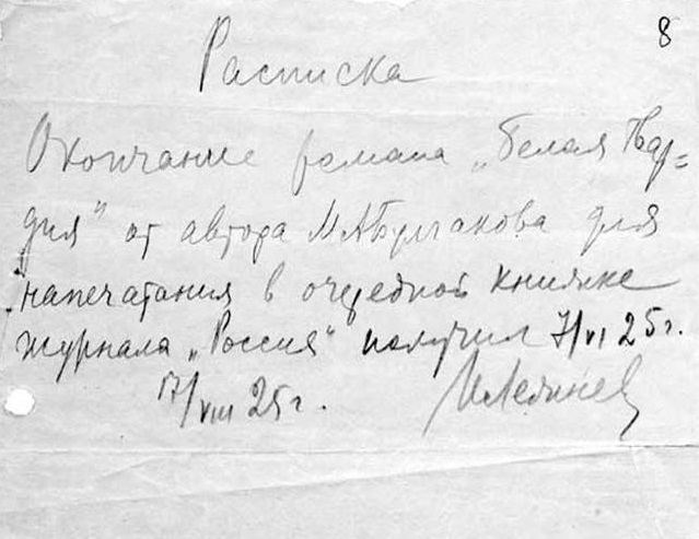 Расписка И.Лежнева М.Булгакову